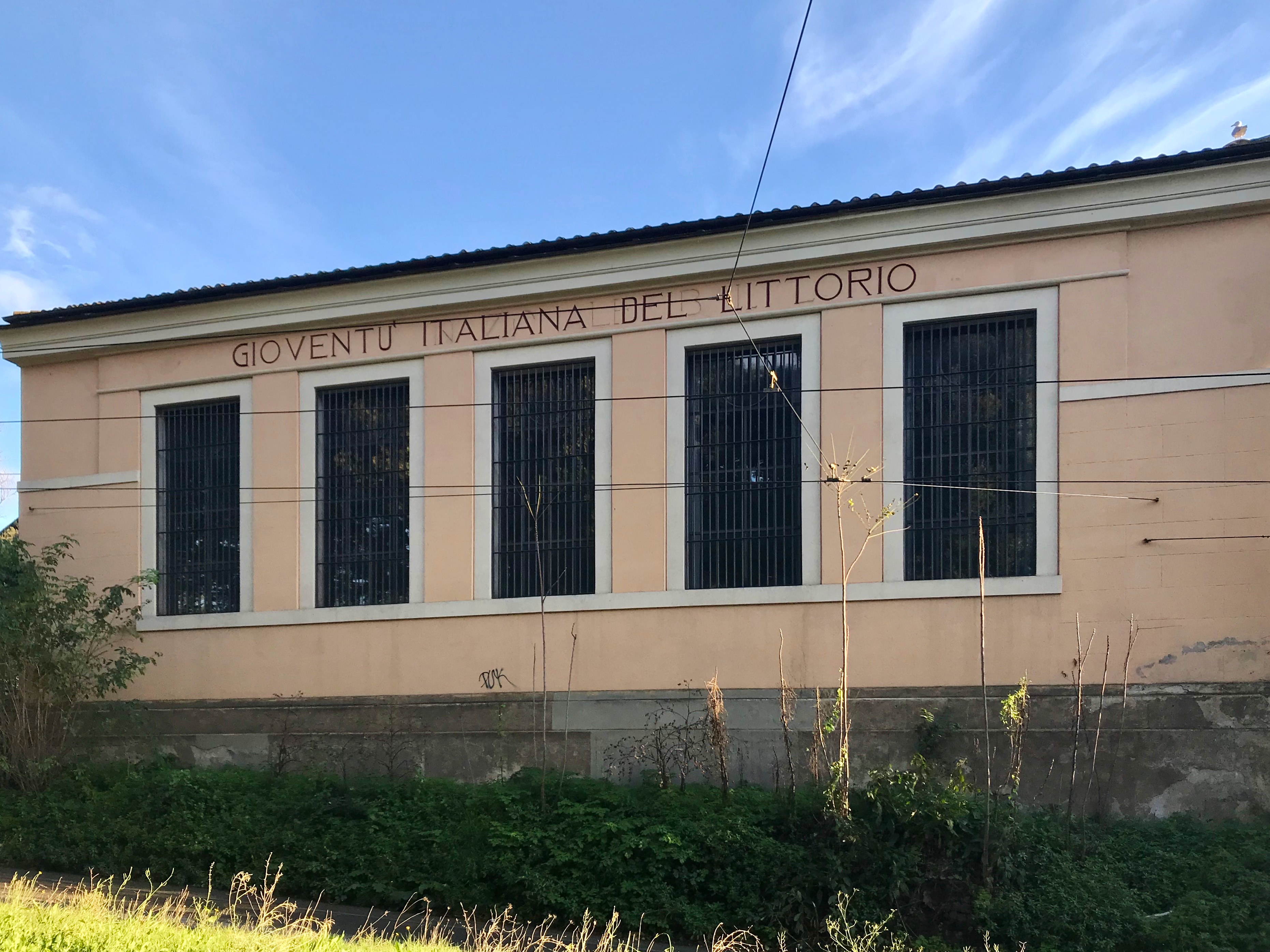 Ex Palestra GIL in Rome